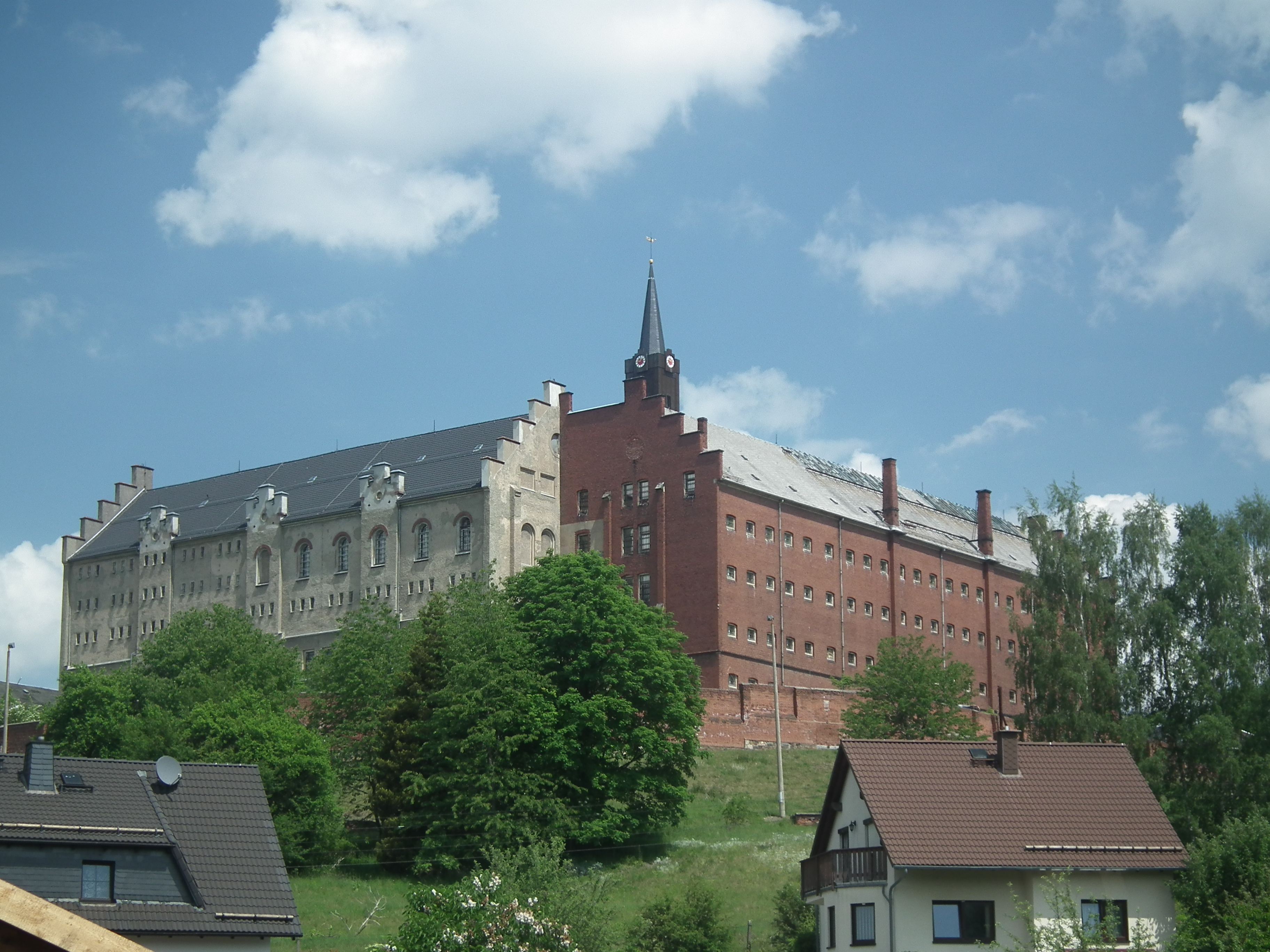 Frauengefängnis Hoheneck in Stollberg/Erzgeb. in Sachsen